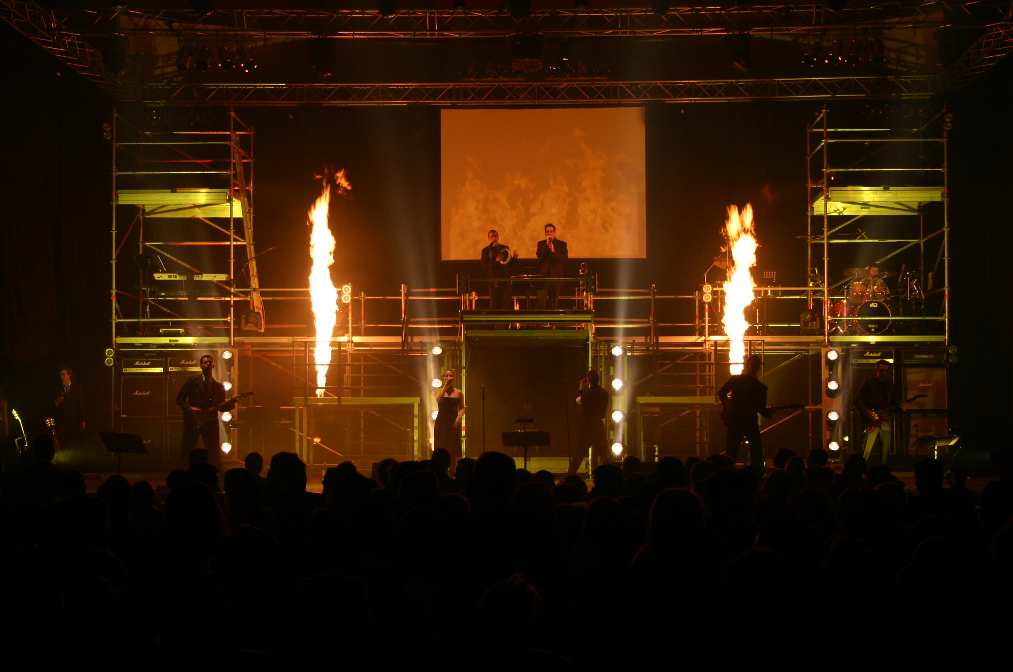 D'Providers um Lécker Bal 2005.